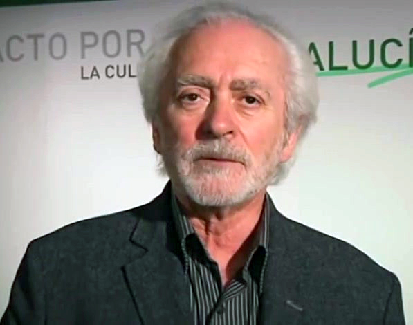 HDL - El granito de luz del guitarrista Manolo Sanlúcar